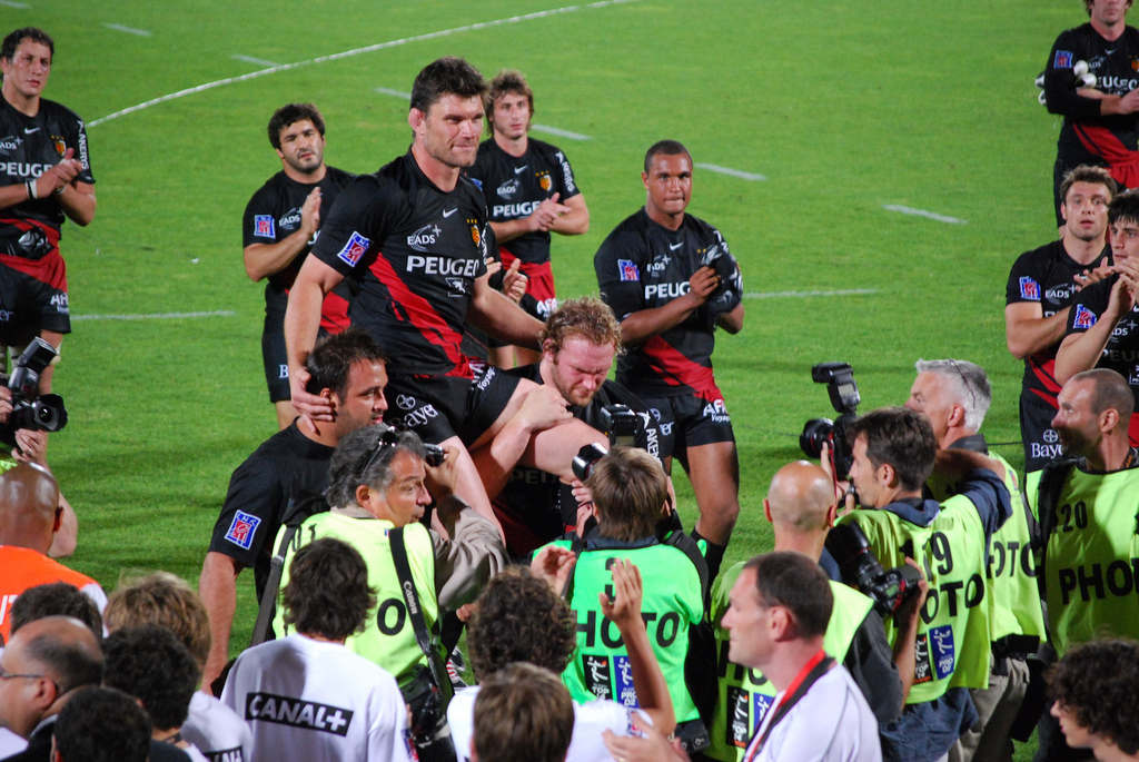 Fabien Pelous porté en triomphe à la fin de la demi-finale Stade toulousain / ASM Clermont Auvergne du top 14 2008-2009